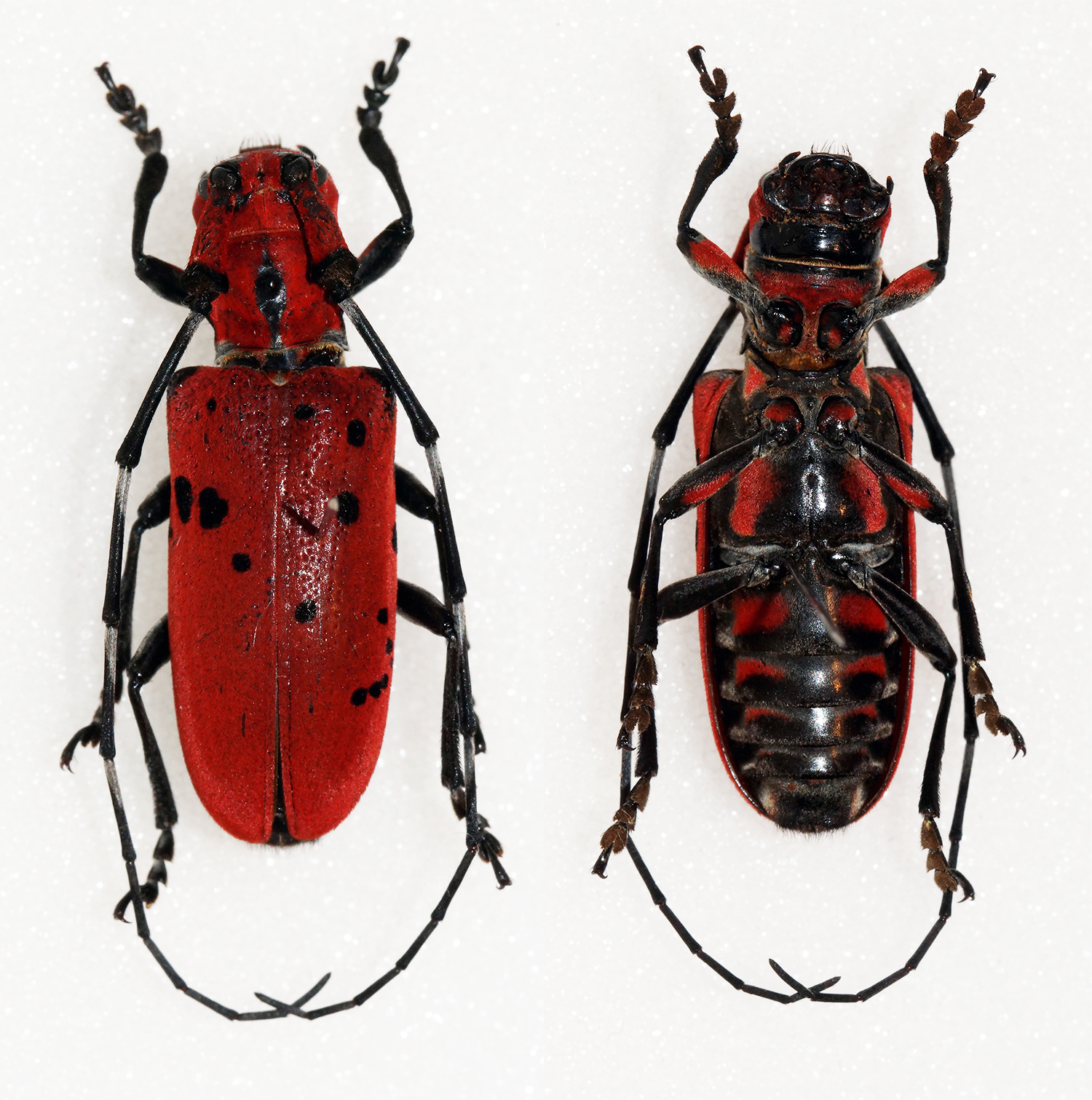 Dalman,1817 Sex: Female Data: 25-04-14 - Mt Dayaoshan - 1200m - Pingban - Jinxiu - Guangxi - China Size: ?